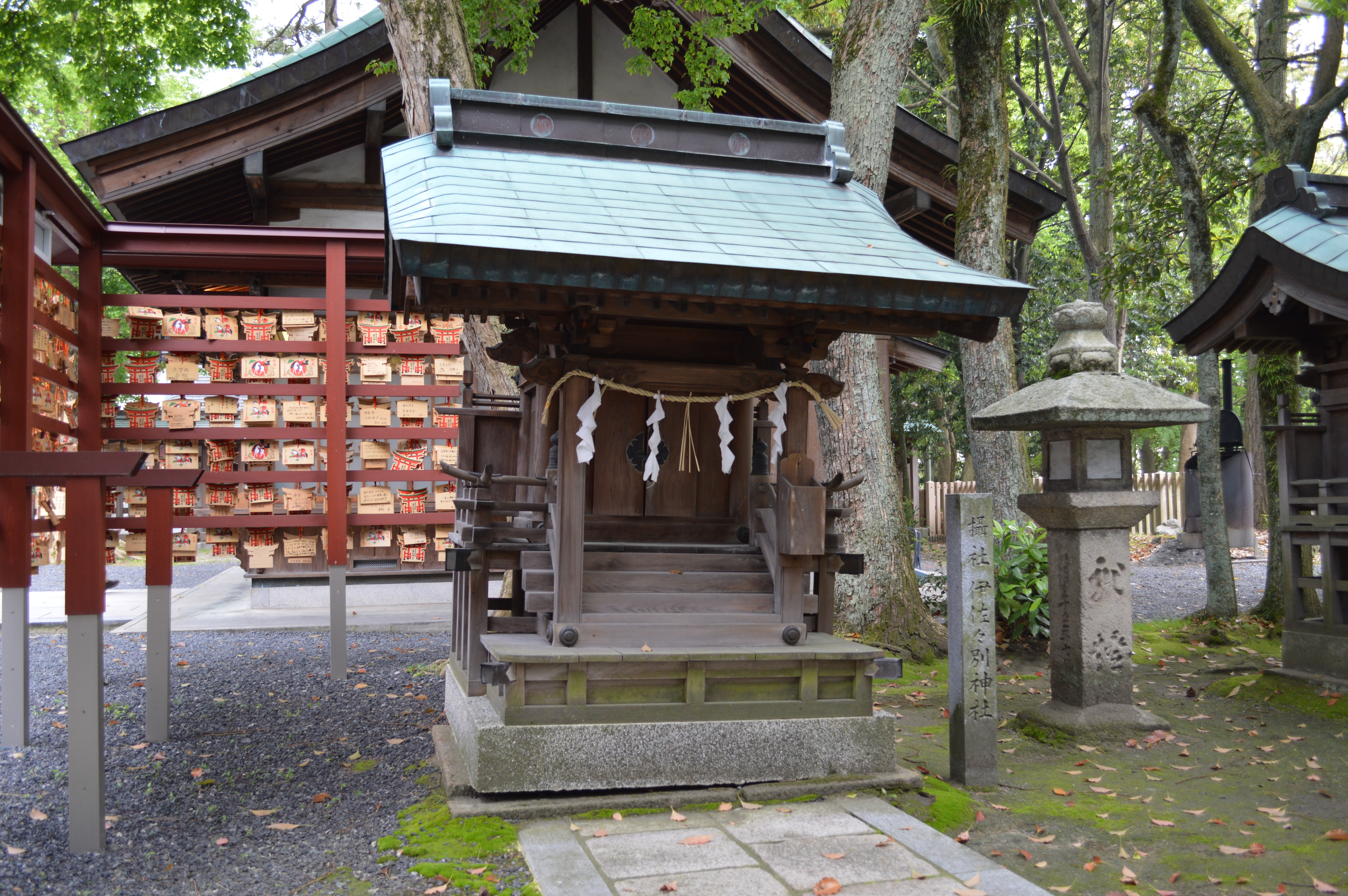 伊佐々別神社 (氣比神宮境内摂社)